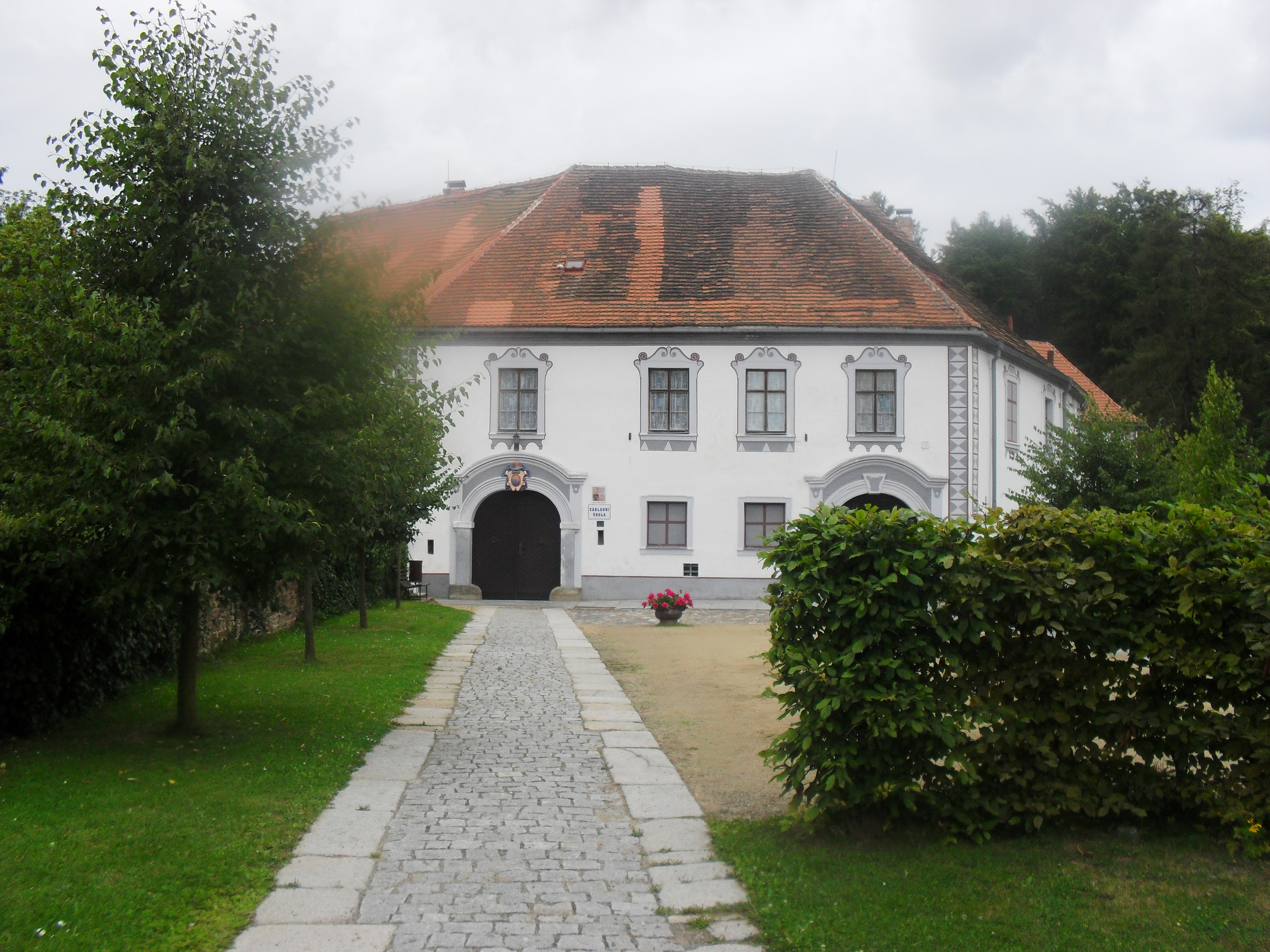 CHANOVICE - Základní škola v areálu Chanovického nádvoří. Poblíž se nechází i tento kostelík